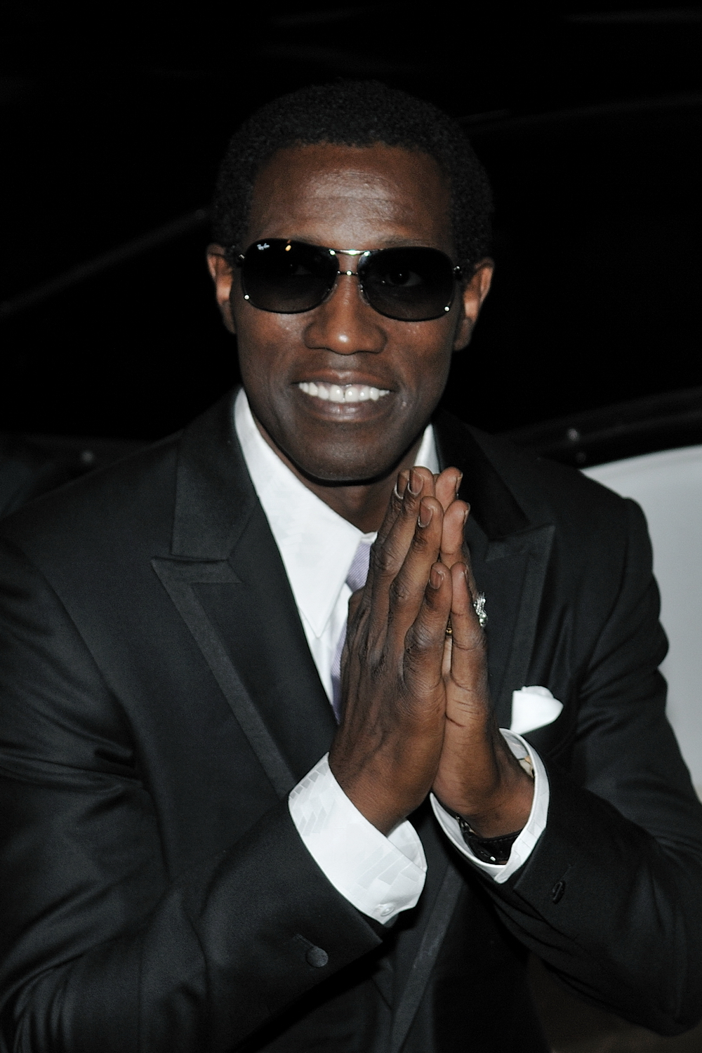 66ème Festival du Cinéma de Venise (Mostra), 8ème jour (07/09/2009) Ethan Hawke et Wesley Snipes partent en bateau privé après la projection de leur film Brooklyn's finest